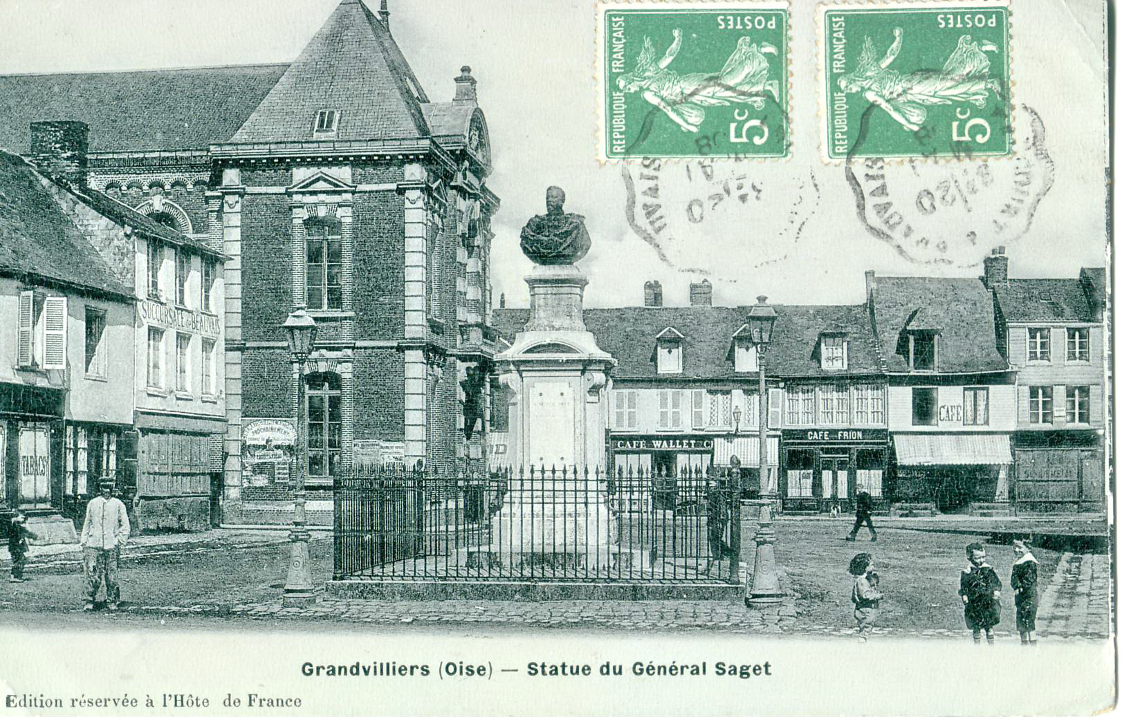 Carte postale ancienne éditée par l'Hôtel de FranceGrandvilliers (Oise) - Statue du général SagetLe monument a été coçu par Charles Garnier, l'architecte de l'Opéra de Paris